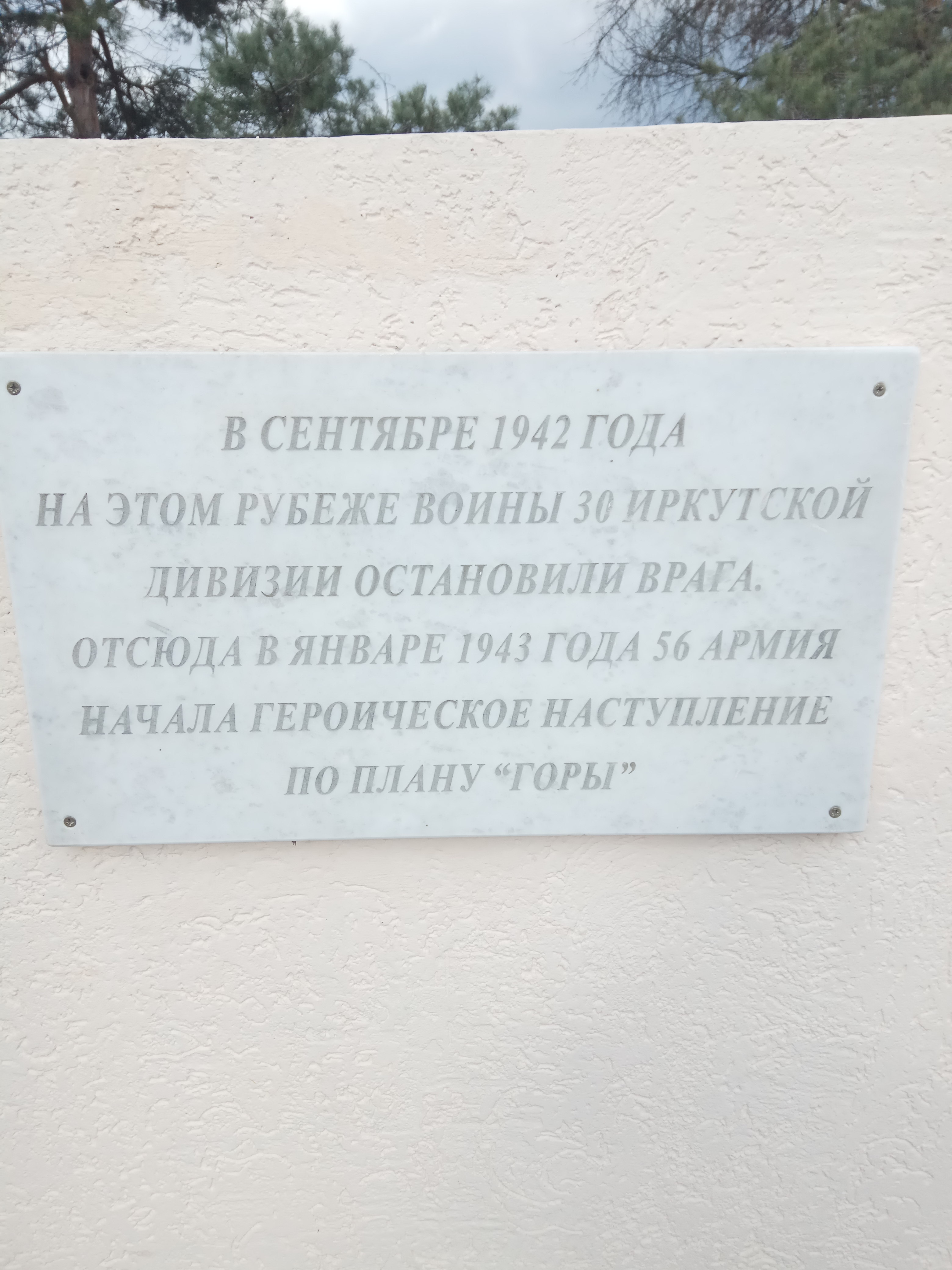 Мемориальная доска 30 Иркутская дивизия шоссе Краснодар-Джугба